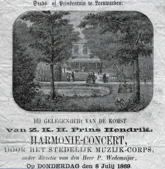 Aankondiging concert o.l.v. P. Wedemeijer in de Prinsentuin in Leeuwarden